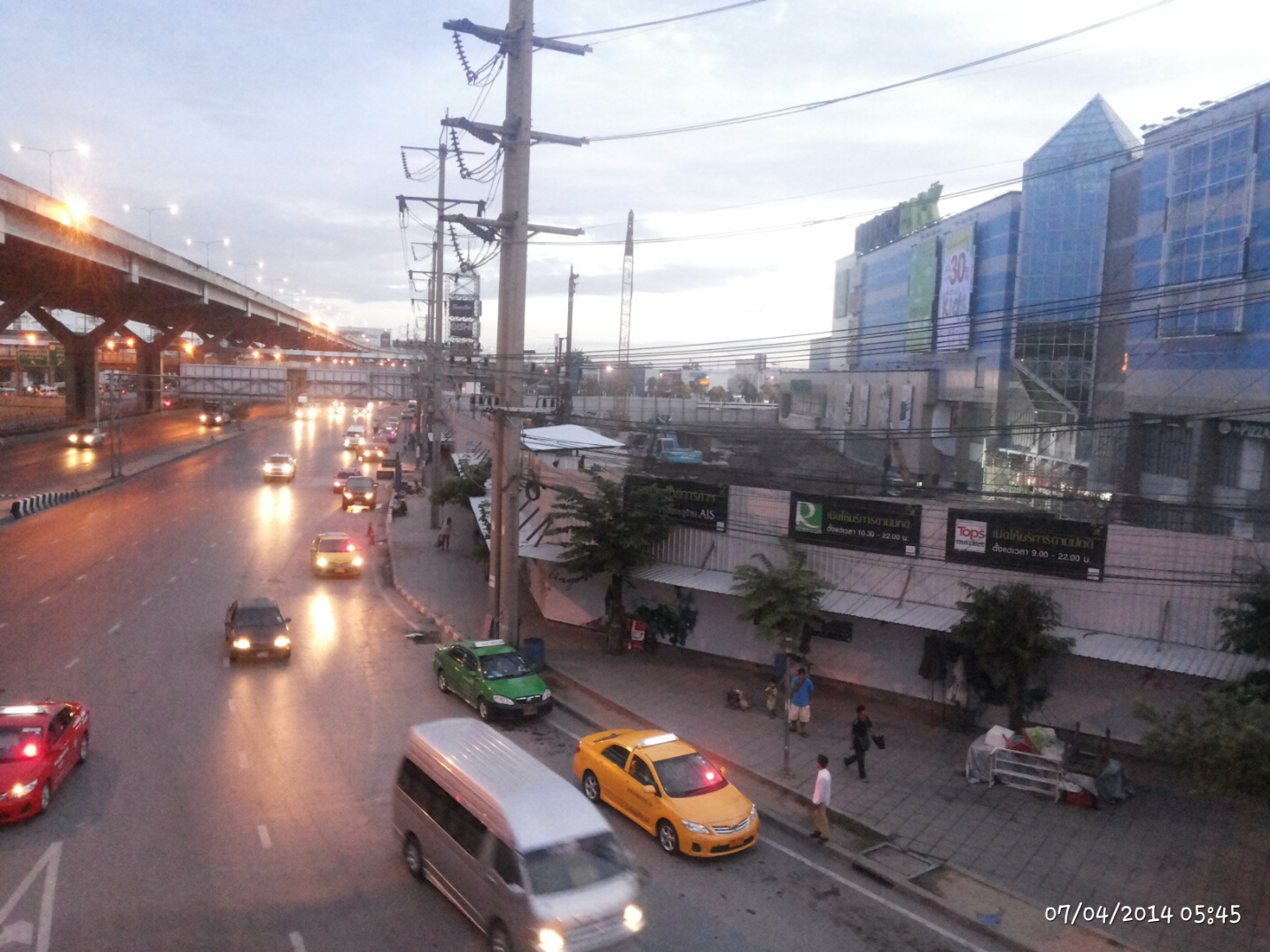 รังสิต